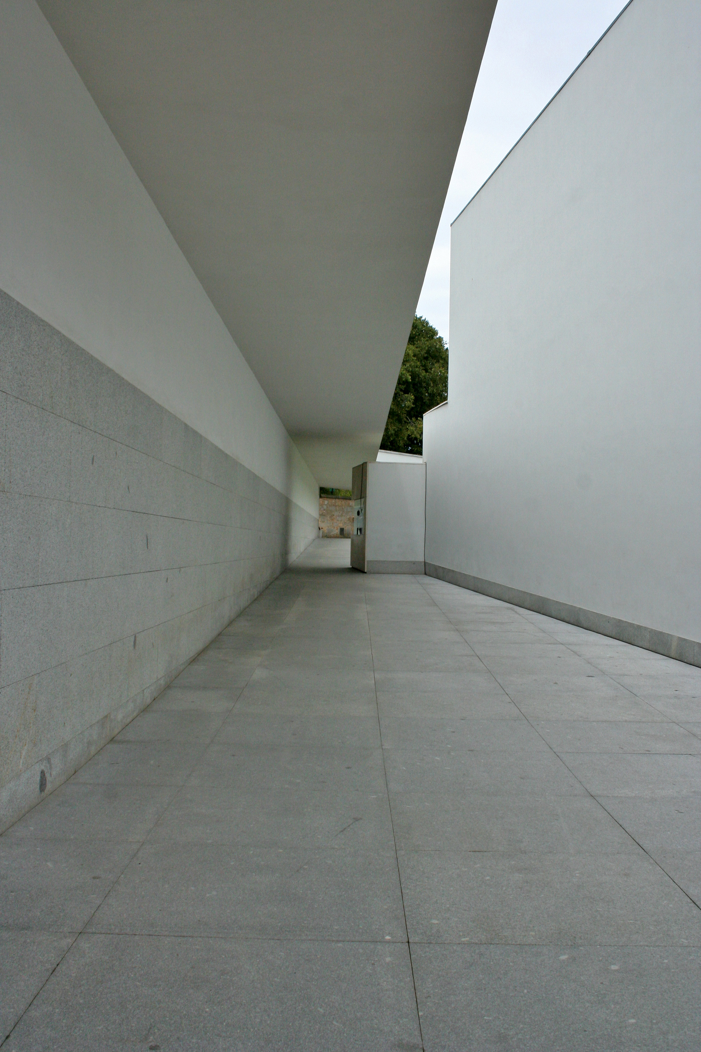 Museu de Serralves) This file was uploaded for Wiki Loves Monuments in Portugal with the unique identifier 74212.